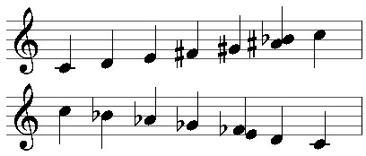 Tonleiter gt